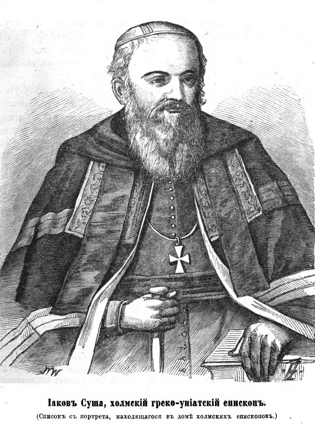 Jakub Jan Susza (1610-1687), unicki biskup chełmski w l. 1652-1687, rycina XIX-wieczna na podstawie portretu w pałacu biskupów chełmskich